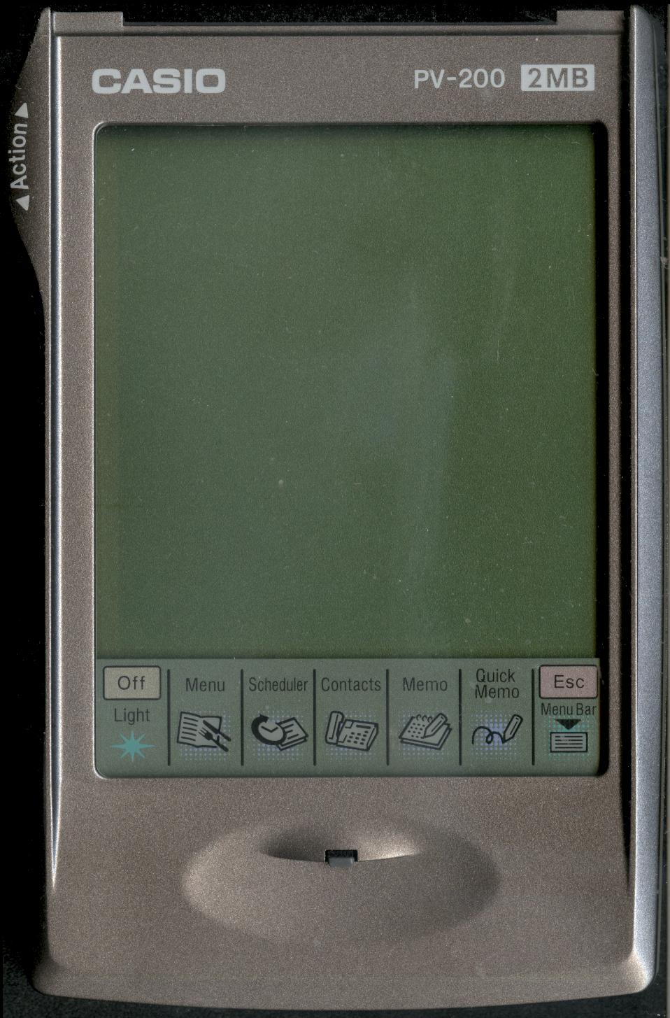 Casio PV-200 vista frontal